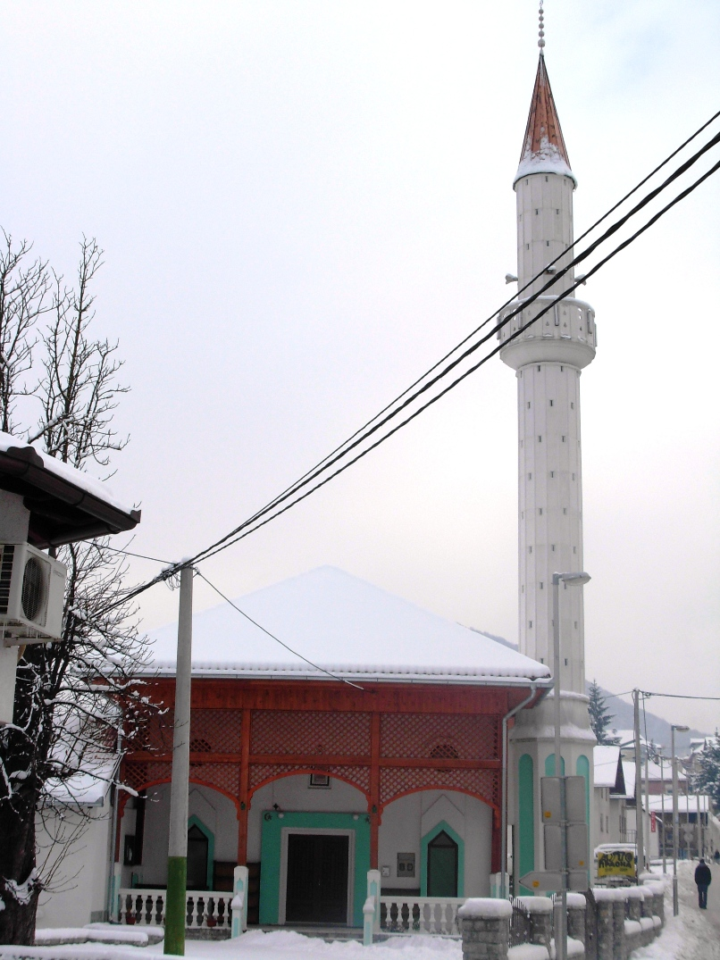 Džamija Hamidija u naselju Rika u Mrkonjić Gradu